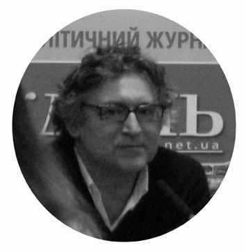 Французький філософ Мішель Онфре.